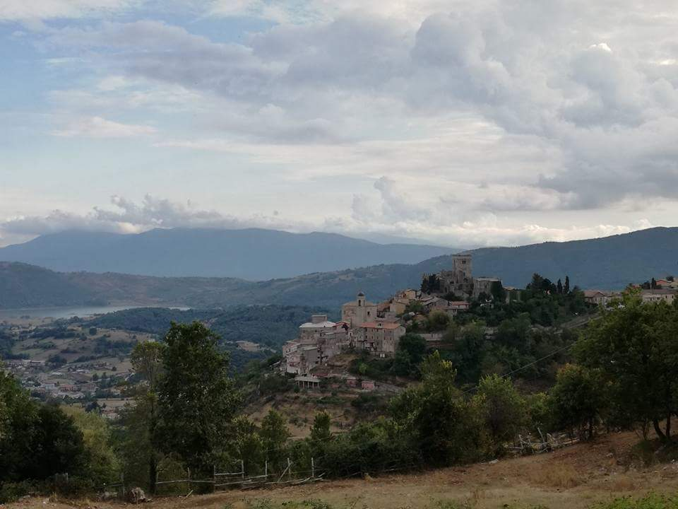 panorama del paese dalla parte nord